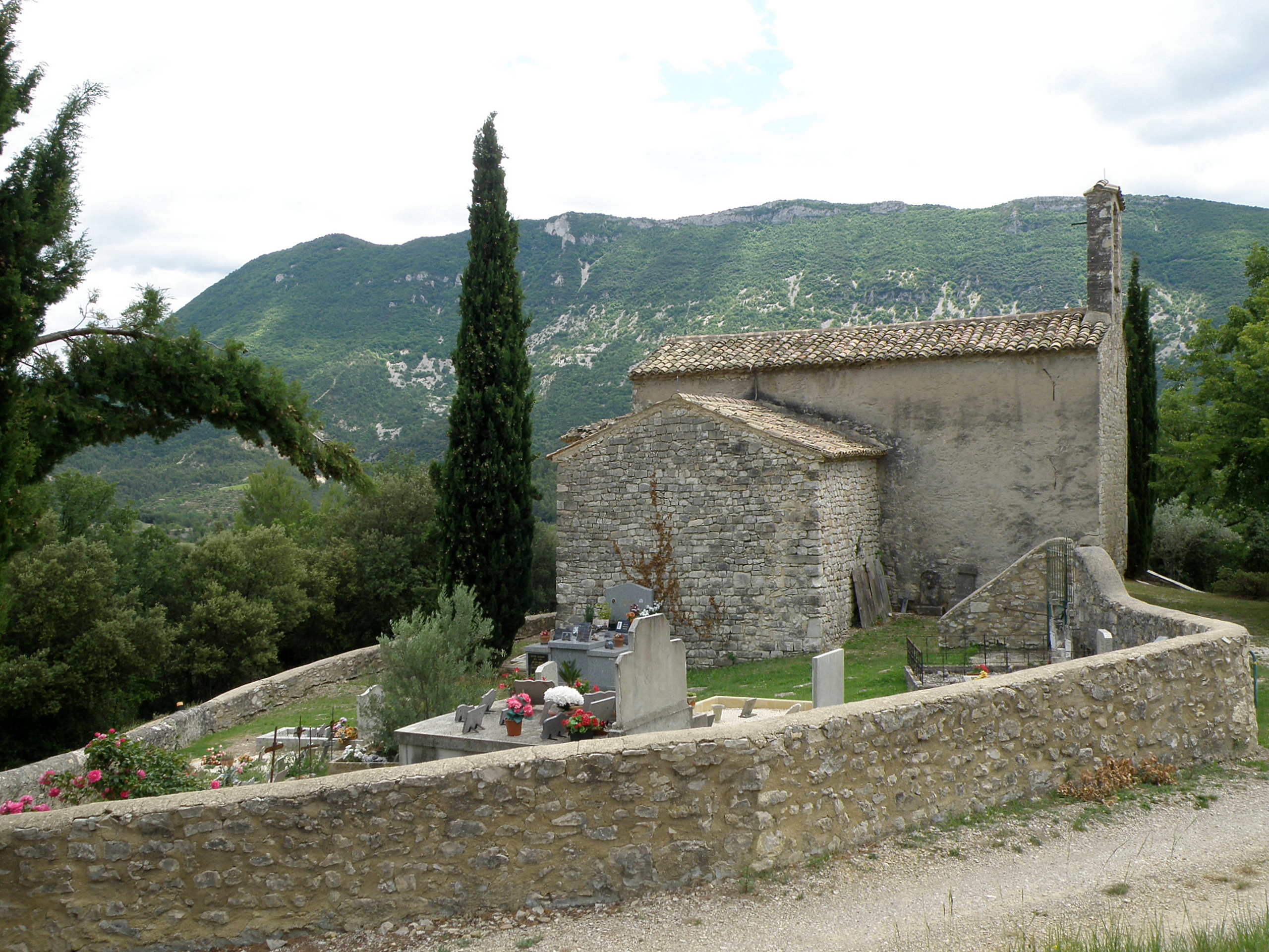 La Penne-sur-l'Ouvèze (Drôme, France). Chapelle Notre-Dame-des-Aspirants. À l'arrière-plan, la montagne de Bluye.